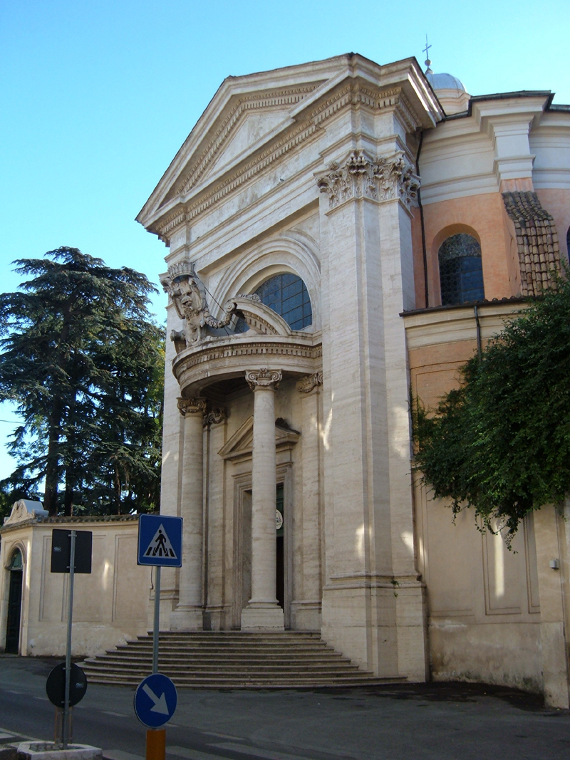 Eglise de Saint André "al Quirinale", dans le quartier Monti, à Rome.